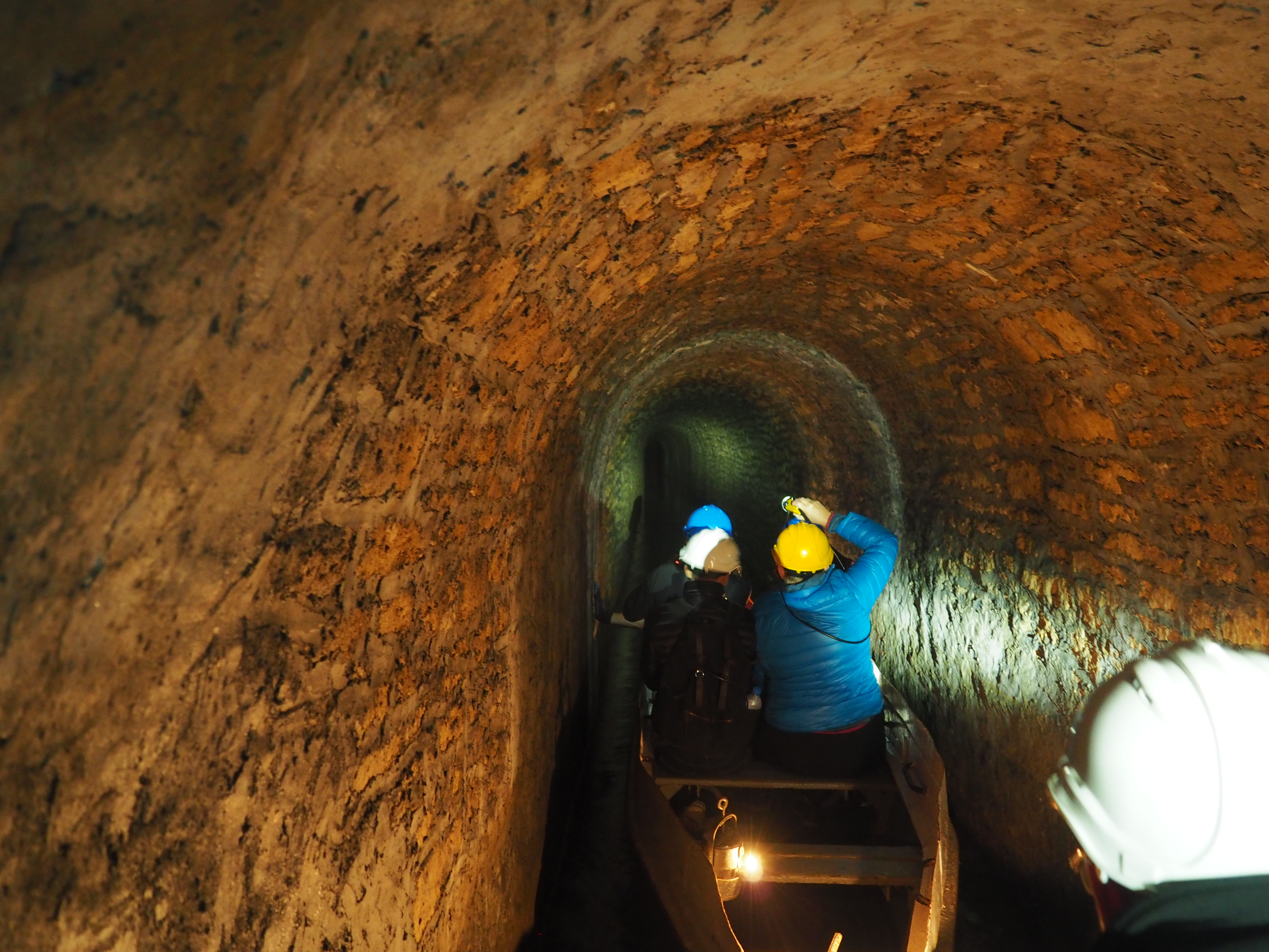 Zdjęcie wykonane w Sztolni Czarnego Pstrąga w Tarnowskich Górach